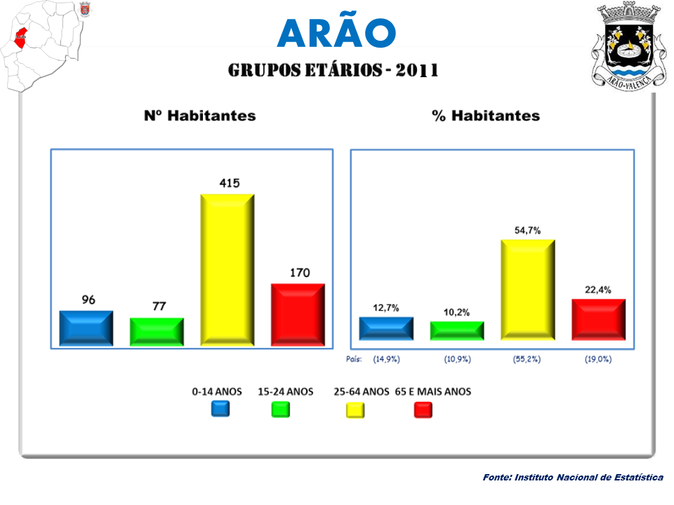 Censos 1864/2011